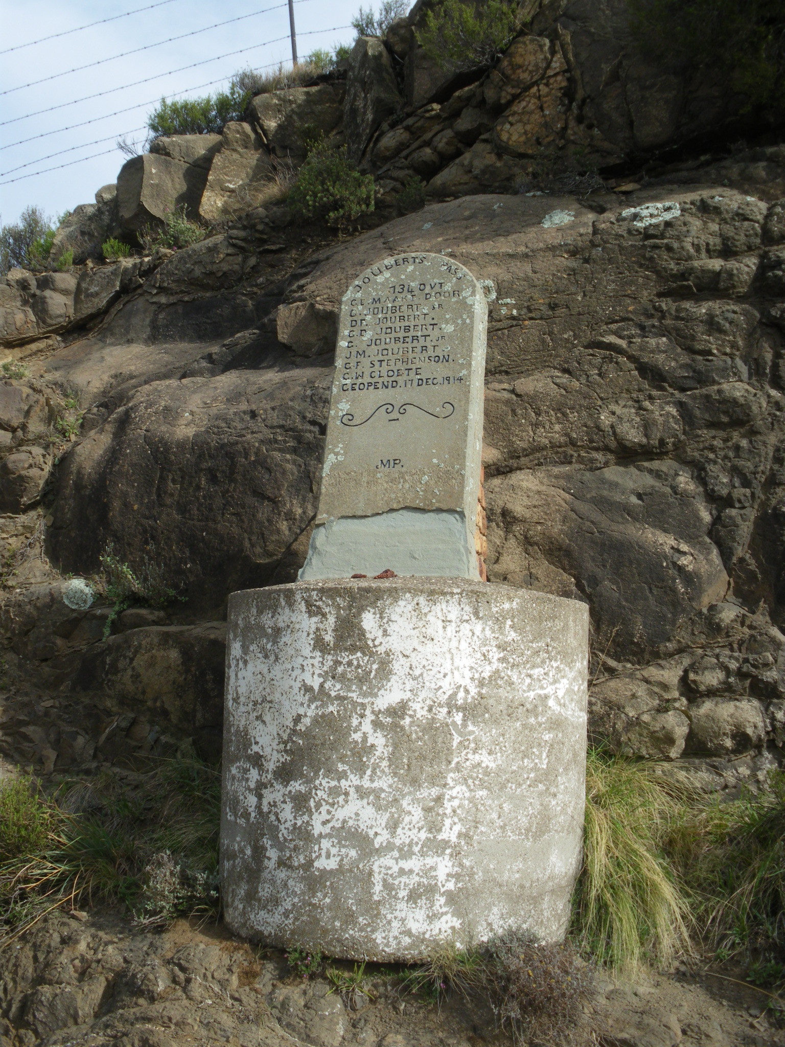 Col de montagne du Joubert's Pass, sur les hauteurs de Lady Grey, Eastern Cape (Witteberg), Afrique du Sud